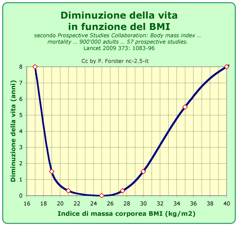 Peso corporeo e mortalità